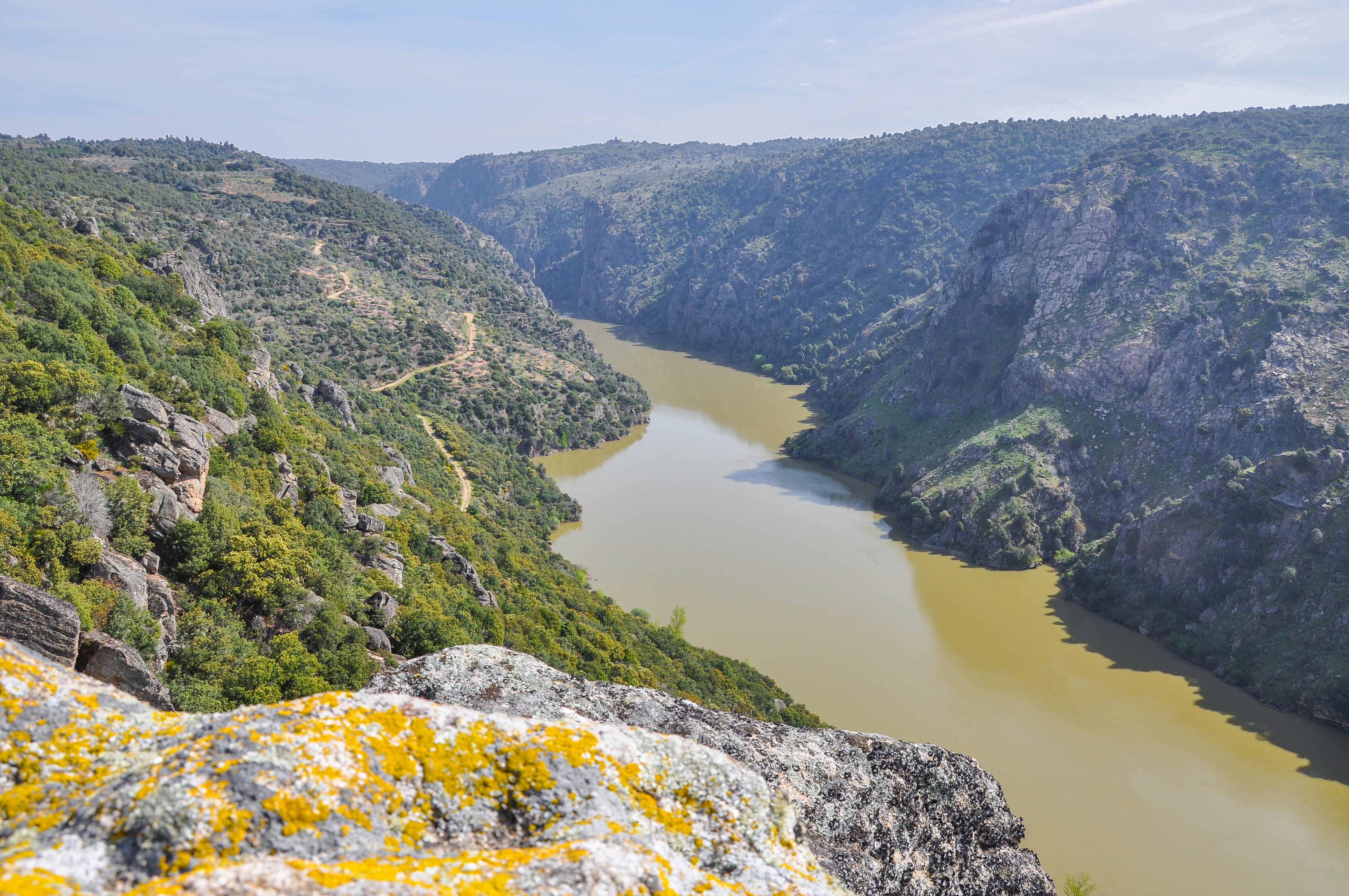 Mirador de Freixiosa, río Duero, Tras Os Montes, Portugal. This is a photography of a Site of Community Importance in Portugal with the ID: PTCON0022. Natura2000 entry, EEA entry This is a photography of a Special Area of Conservation in Spain with the ID: ES4150096. Natura2000 entry, EEA entry